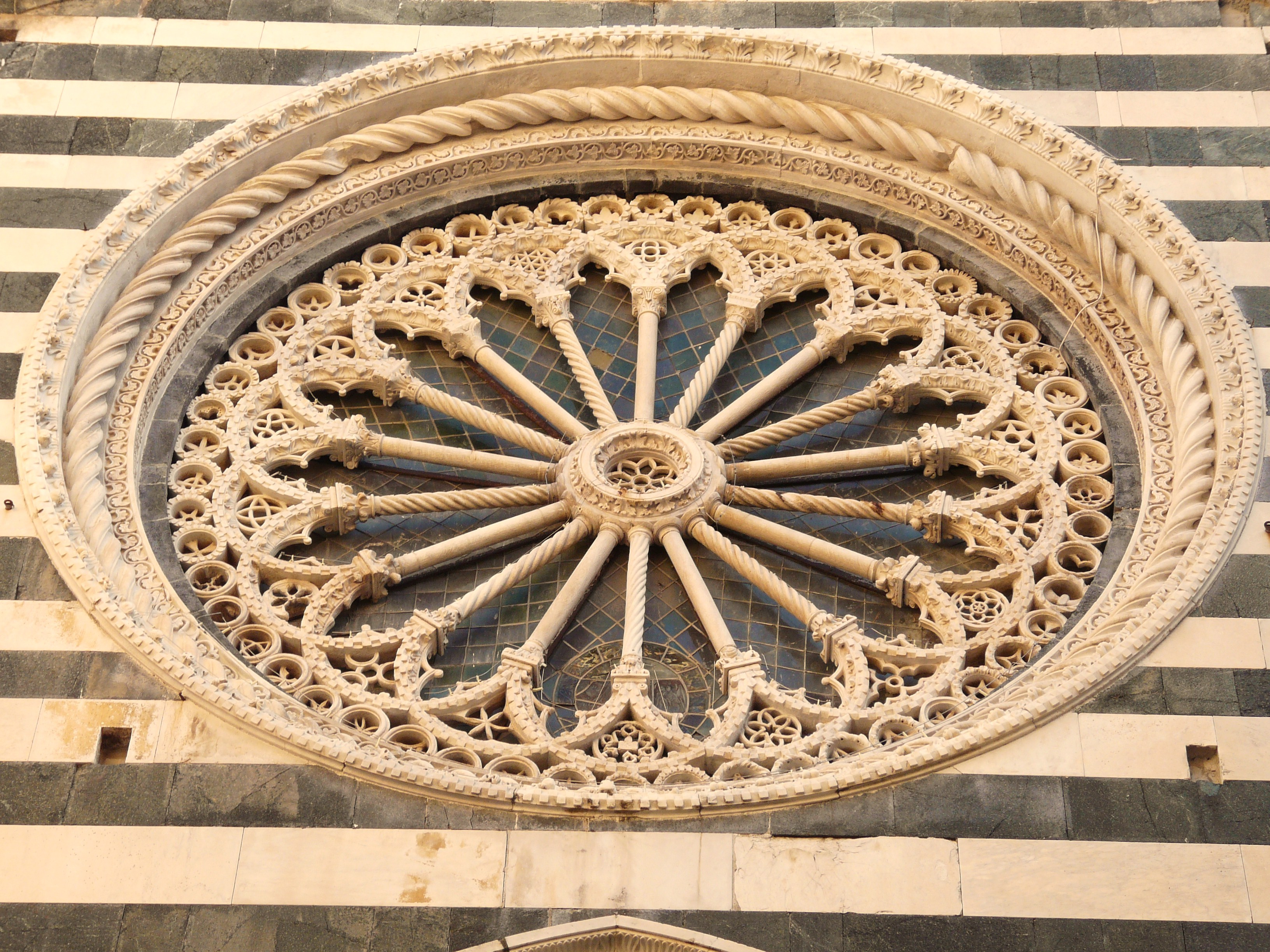 Rosone della chiesa di San Giovanni Battista, Monterosso al Mare, Cinque Terre, La Spezia, Liguria, Italia